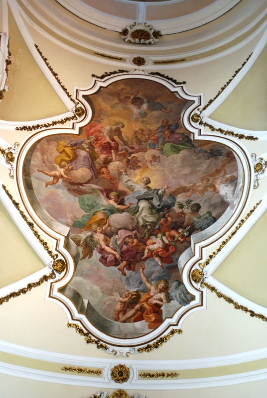 Assunzione della Vergine con la Trinità e i Santi Anna e Gioacchino, Giuseppe, Giovanni Battista, Davide e i patriarchi, cherubini, angeli e arcangeli (1735)